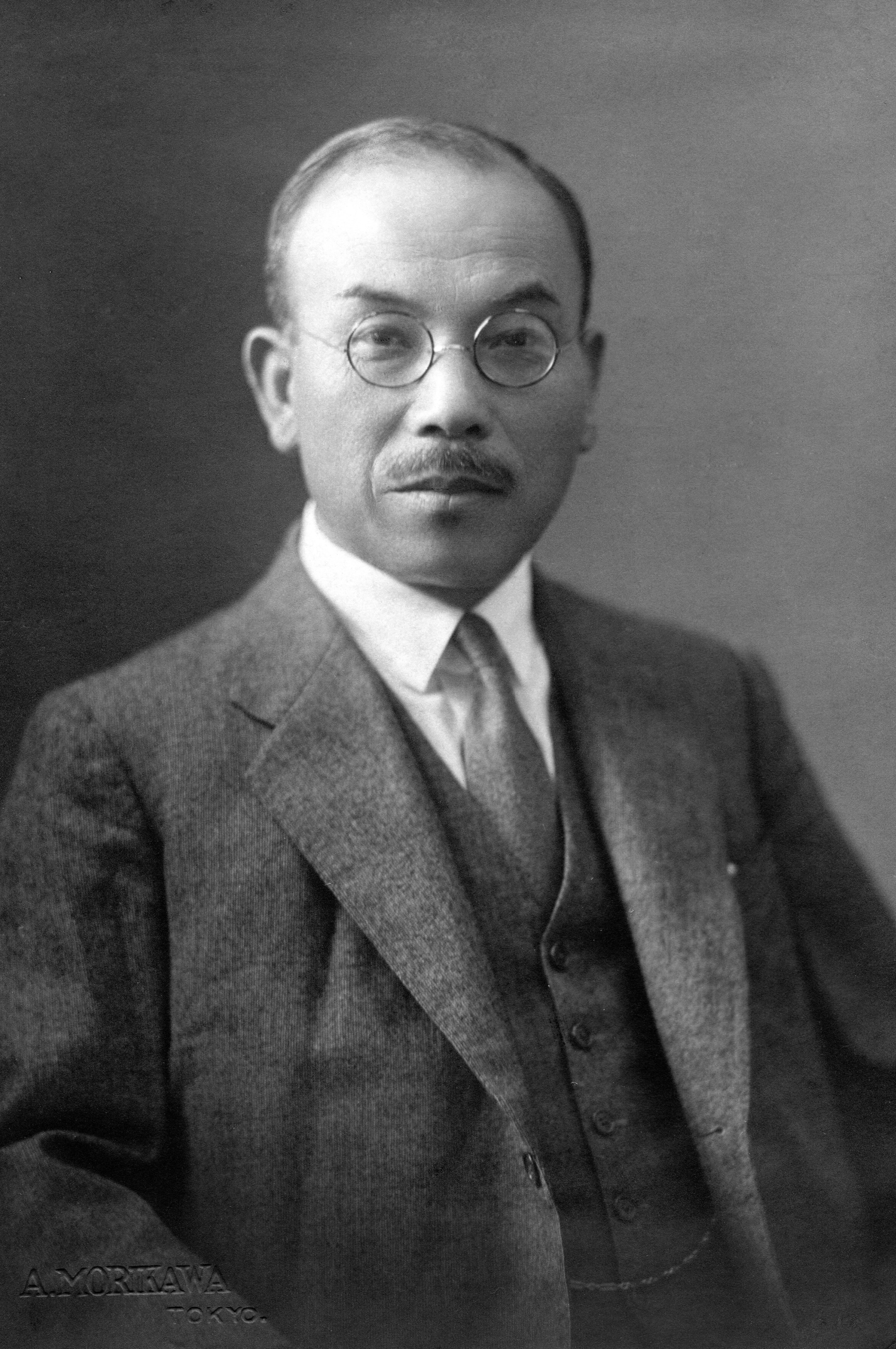 貴族院議員時代の宮田光雄